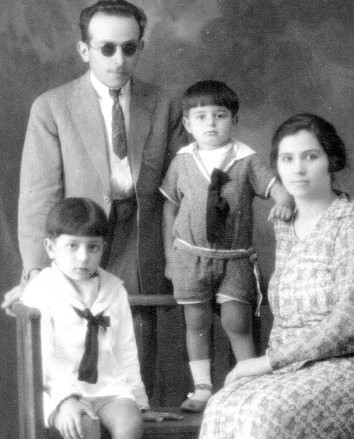 Fotografía del escultor Erminio Blotta y su familia (aproximadamente en 1925). Extraída del álbum familiar